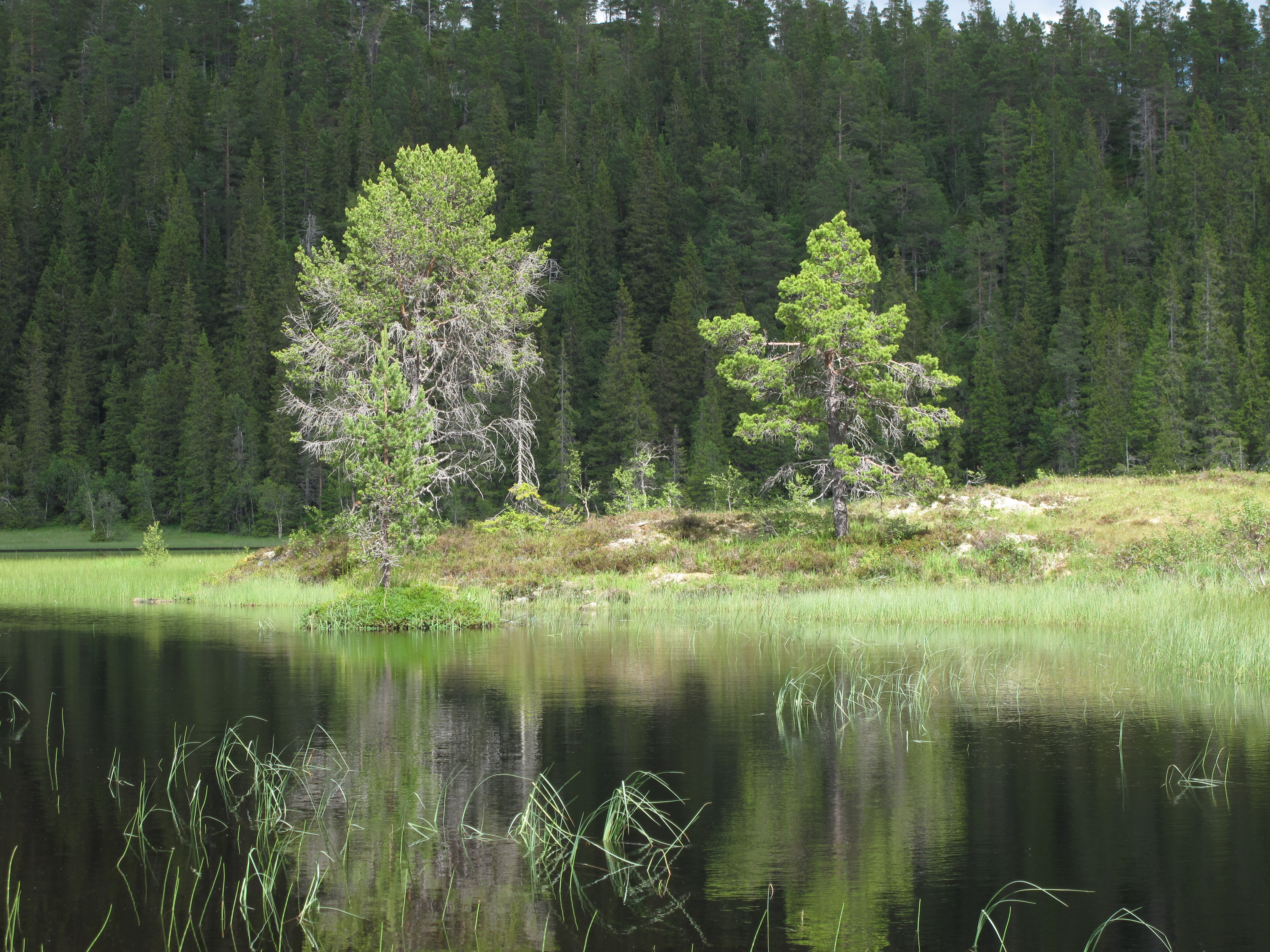 Brølitjønna